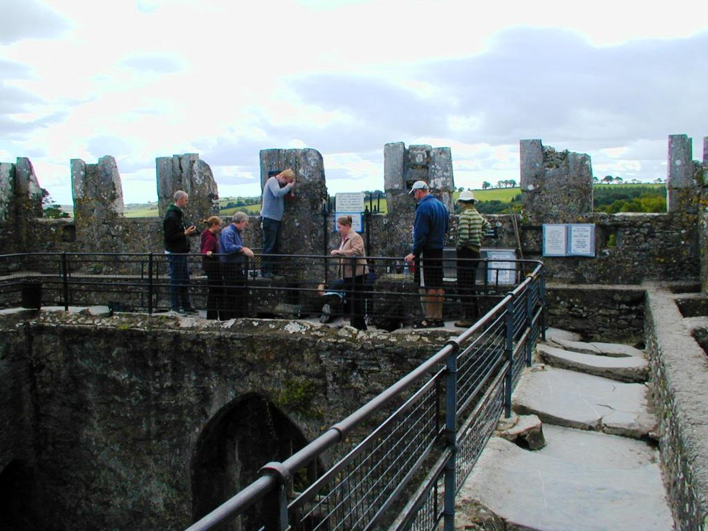 Blarney Castle: Touristen lassen sich beim Küssen des Steines der Sprachgewandheit fotografieren.